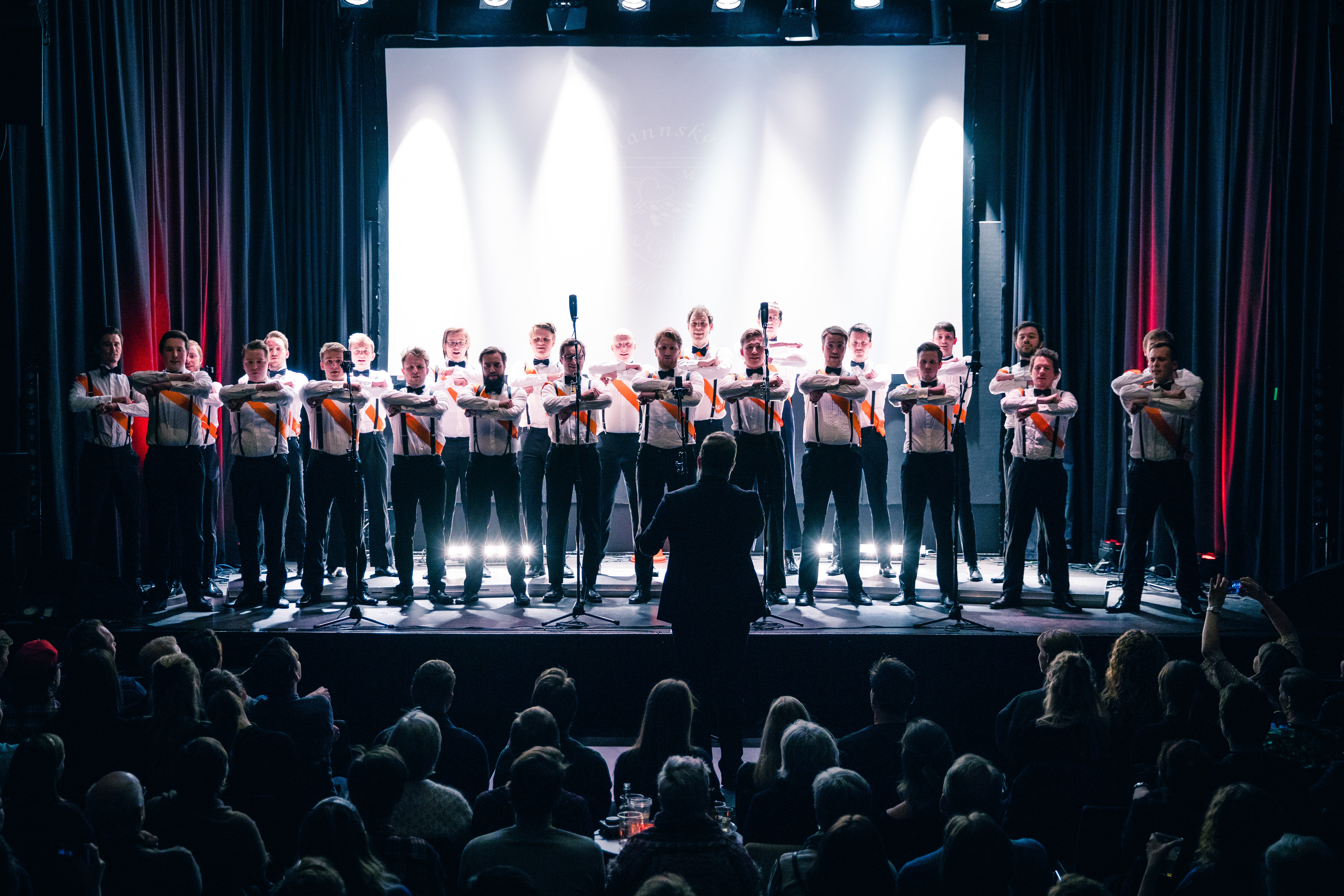 Bilde fra vår konsert på Cosmopolite Scene i anledning vår Osloturné.